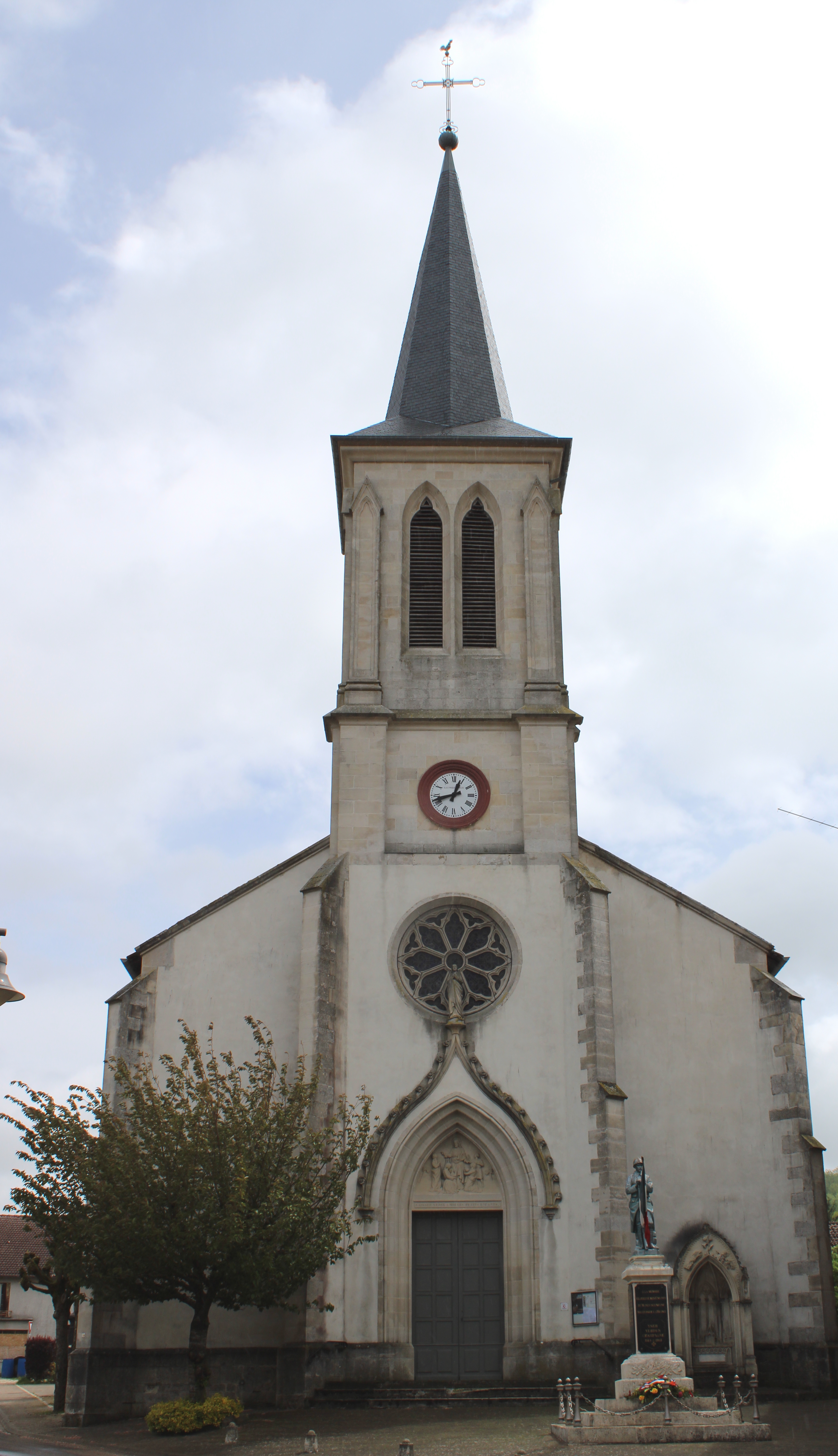 L'église.